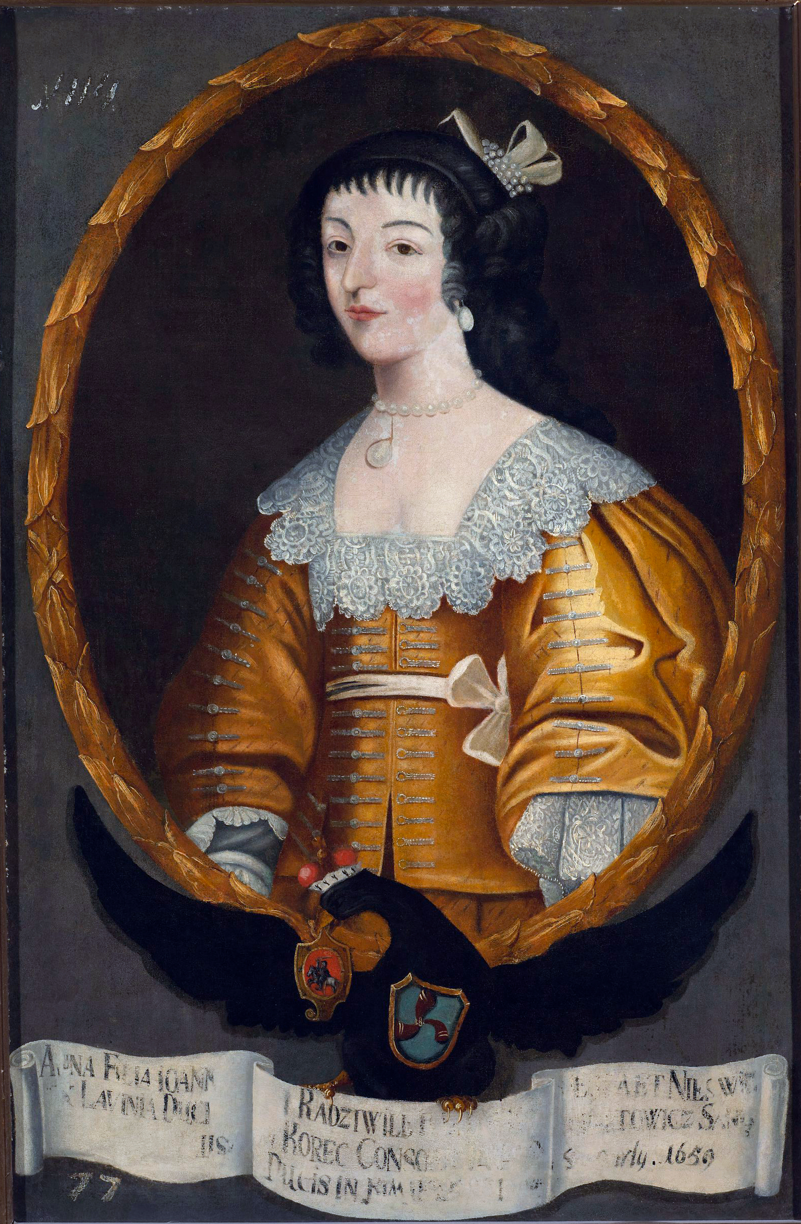 Беларуская (тарашкевіца): Партрэт Ганны Сангушкі (Hanna Sanguška) з князёў Радзівілаў (Radzivił)